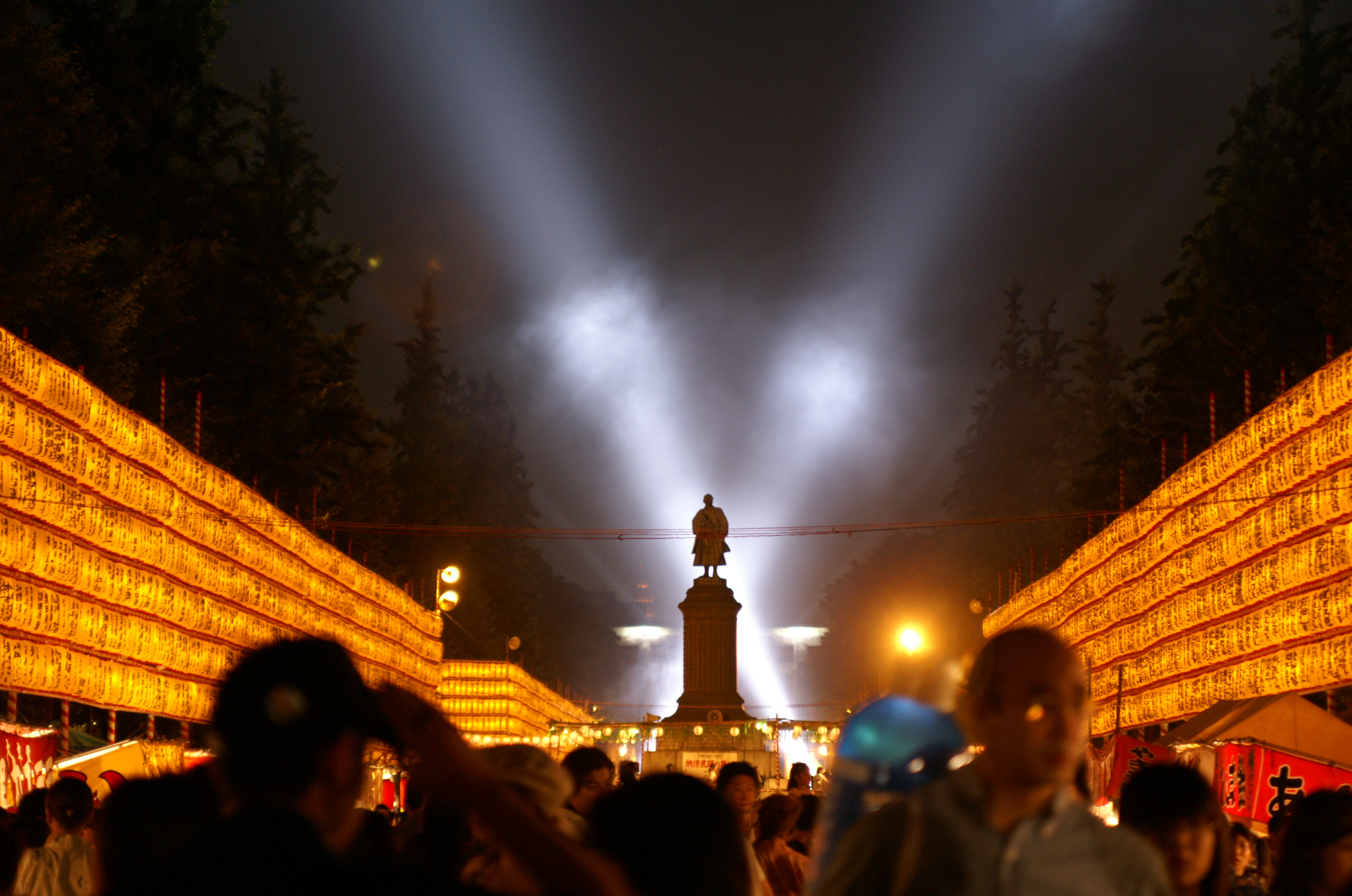 靖国神社みたままつり